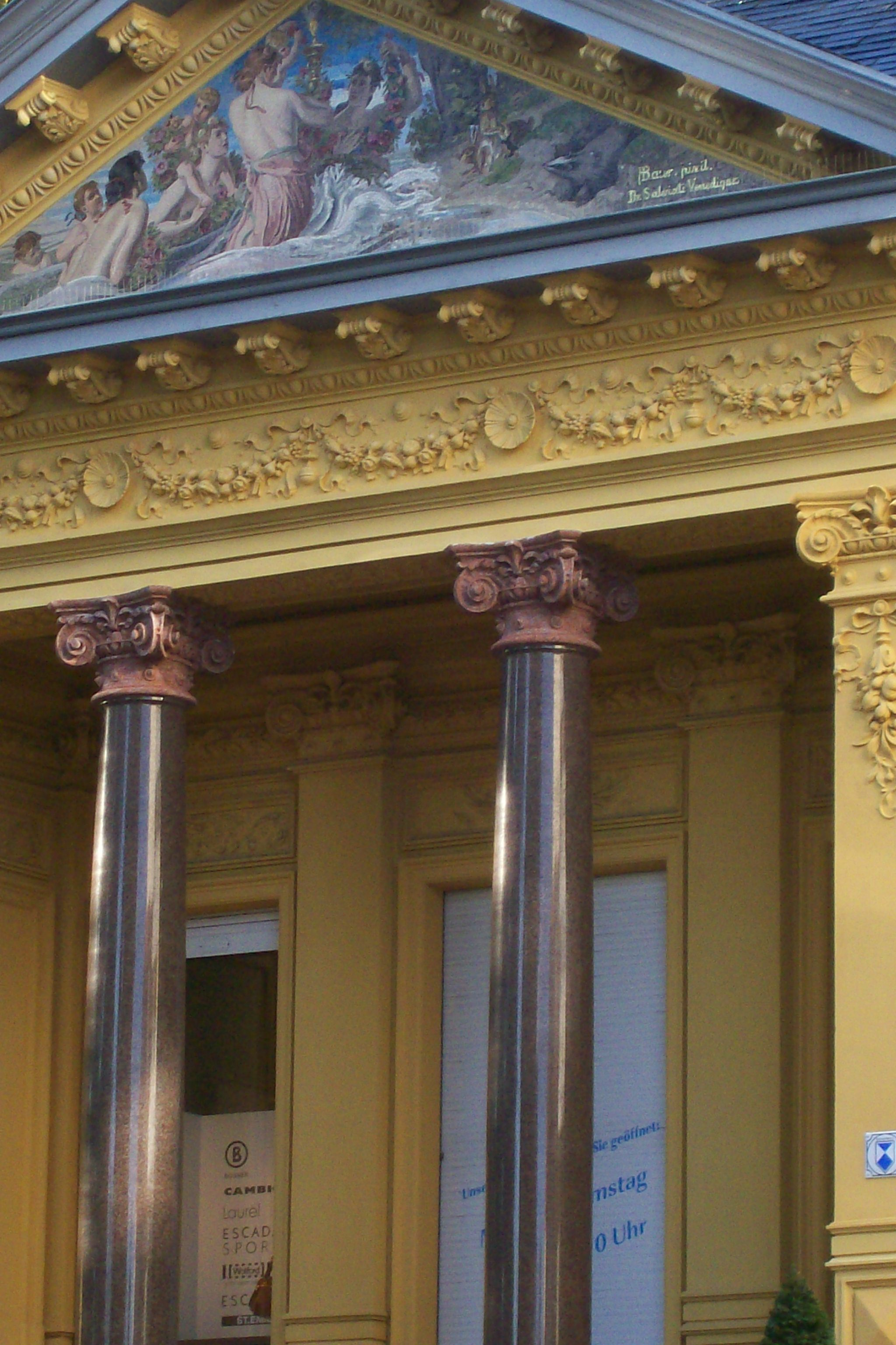 Villa Oechsler in Heringsdorf, Bäderarchitektur, erbaut 1883, Portikus mit Mosaik von Antonio Salviati